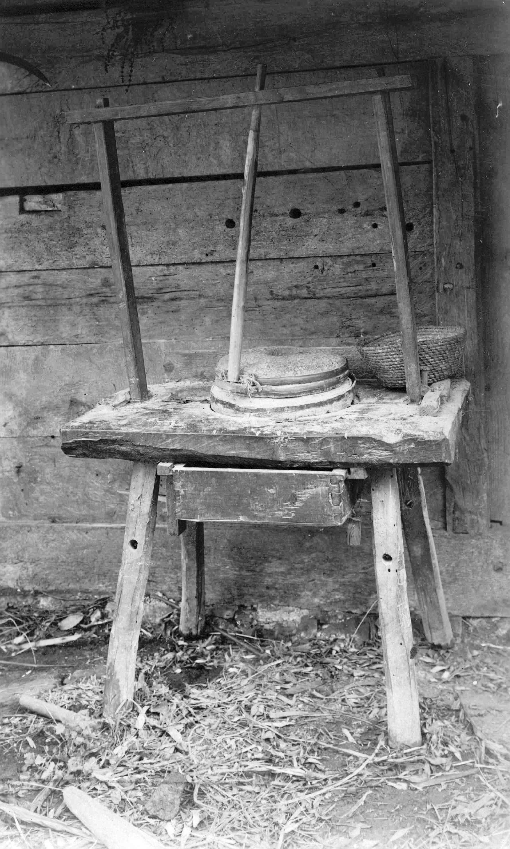 Žrmlje - domače orodje (ročni mlin)